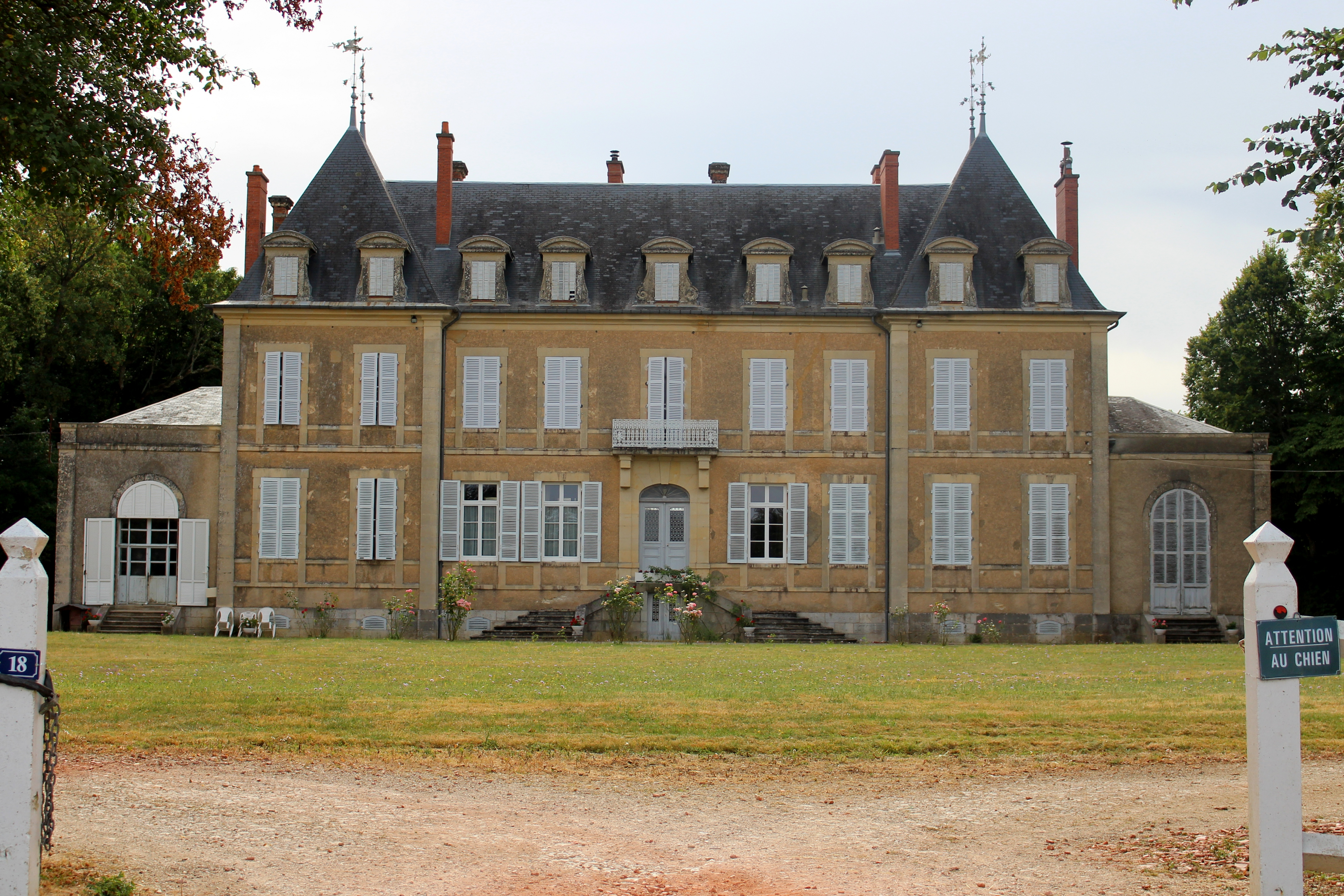 Lantan, Cher